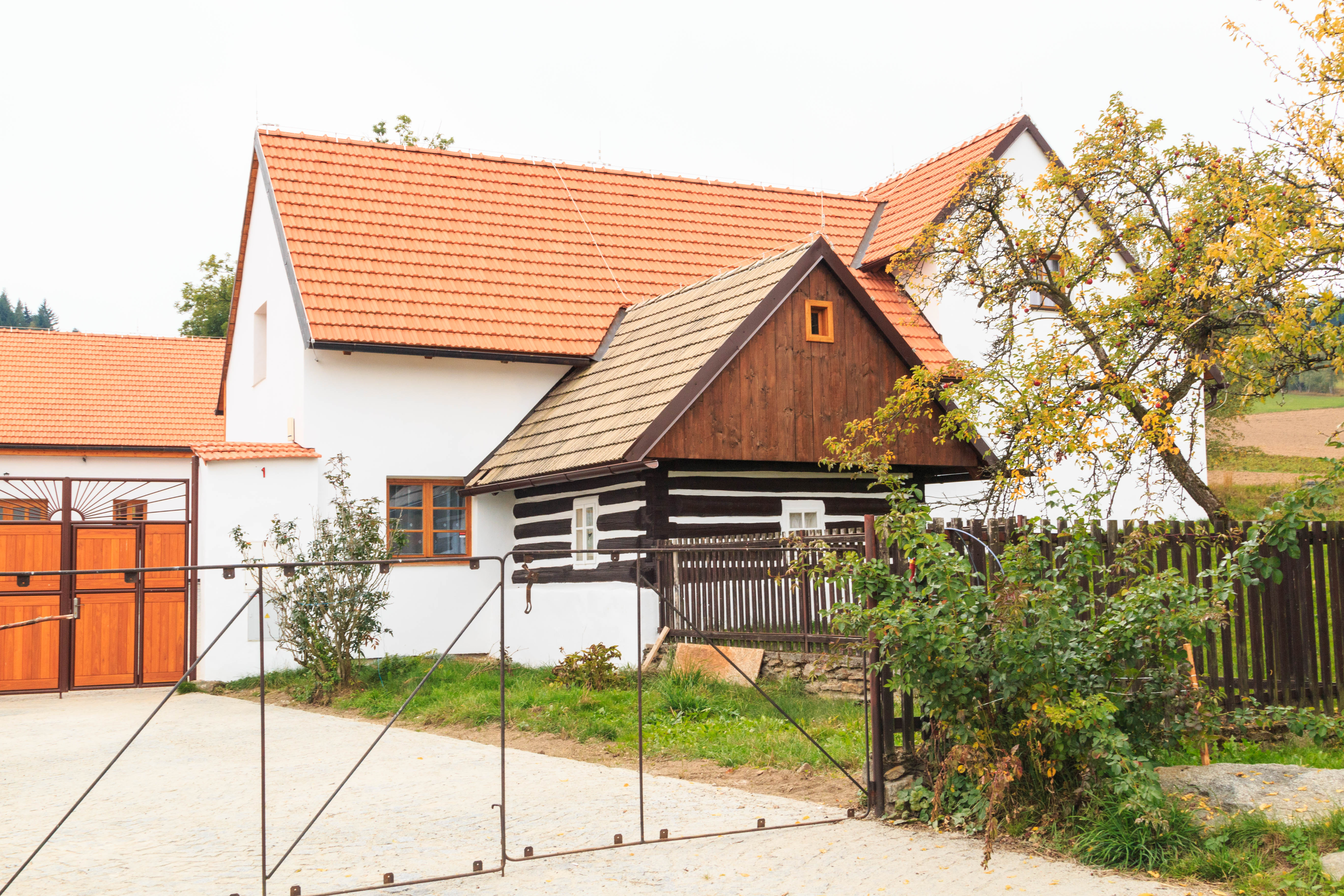 Usedlost čp. 1, Vojslavice 1, Vojslavice (Šumavské Hoštice).